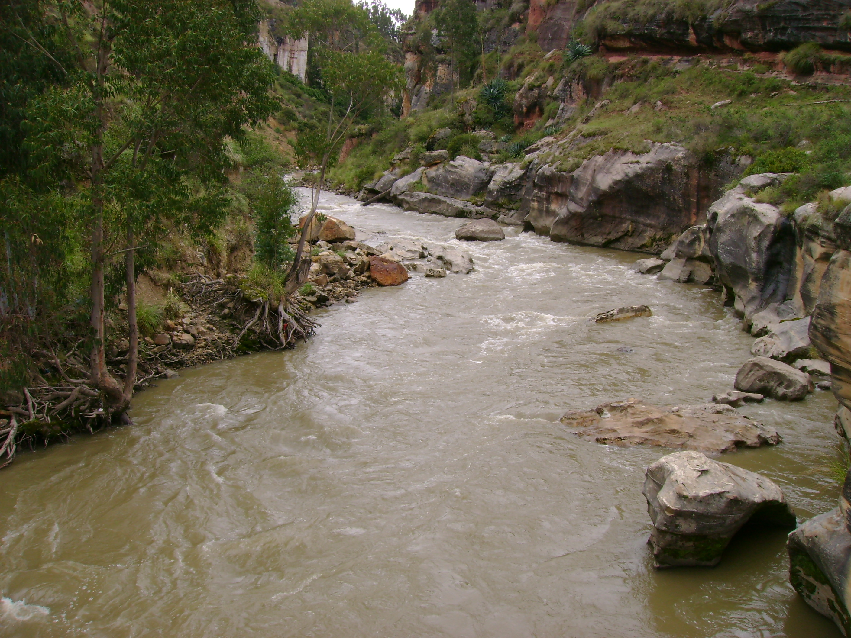 Vista desde el puente Lauricocha.